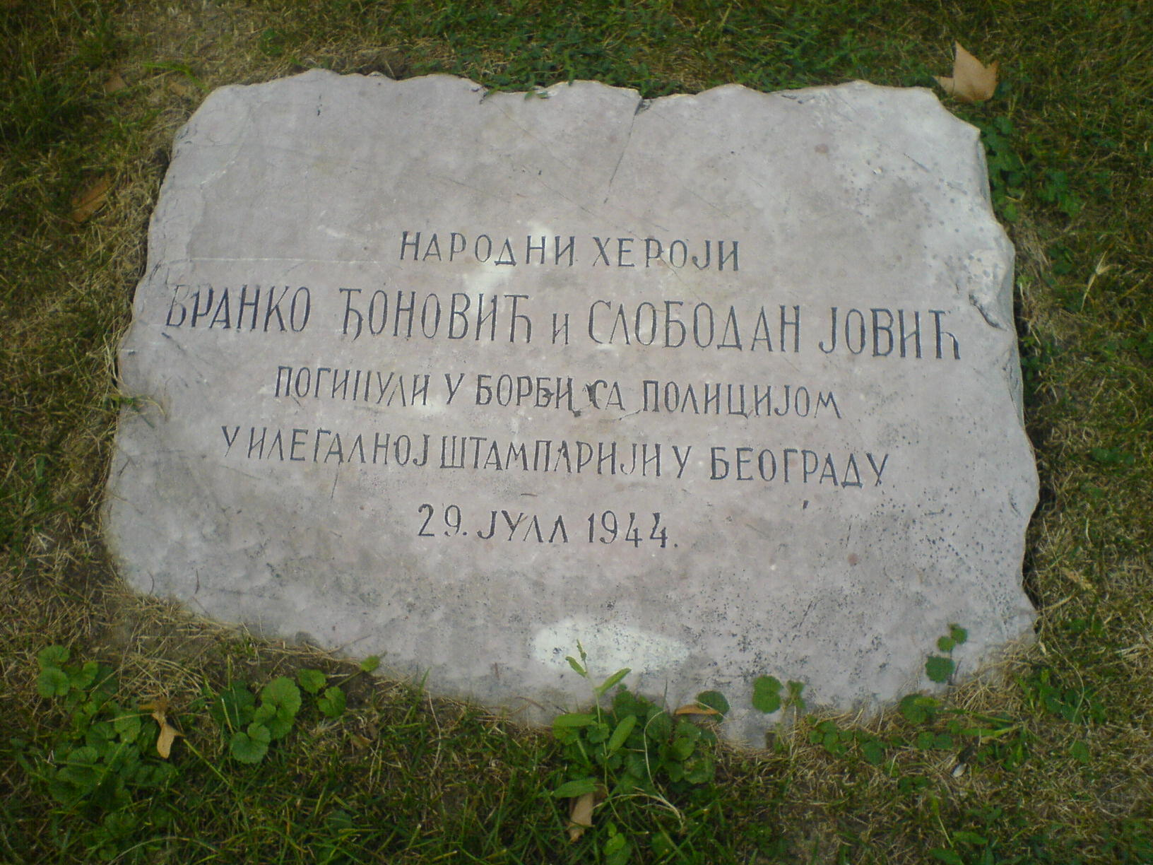 Гроб Бранка Ђоновића и Слободана Јовића.